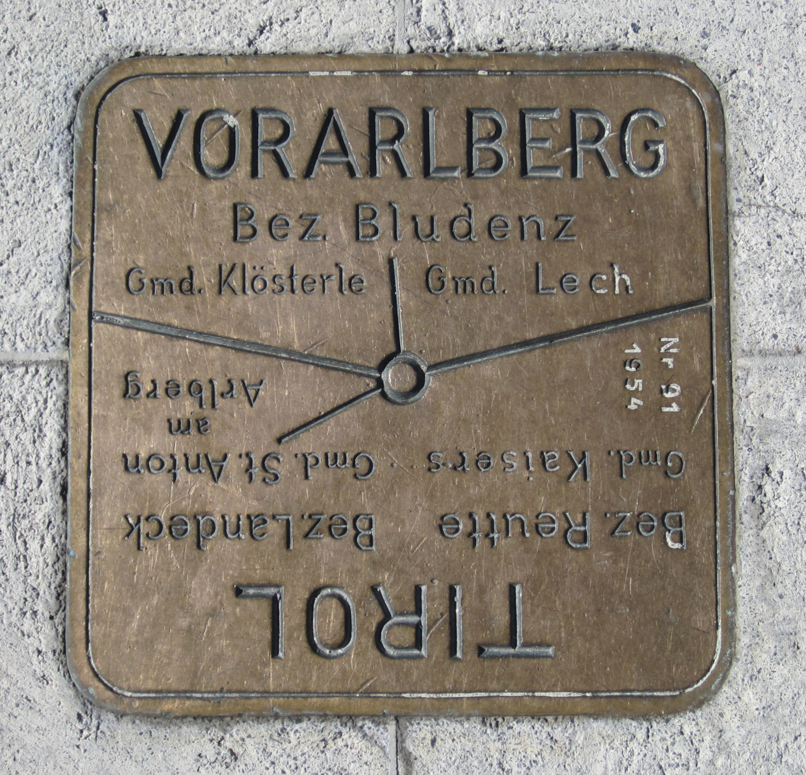 Vermessungstafel Nr. 91 auf der Aussichtsplattform des Vallugagipfels